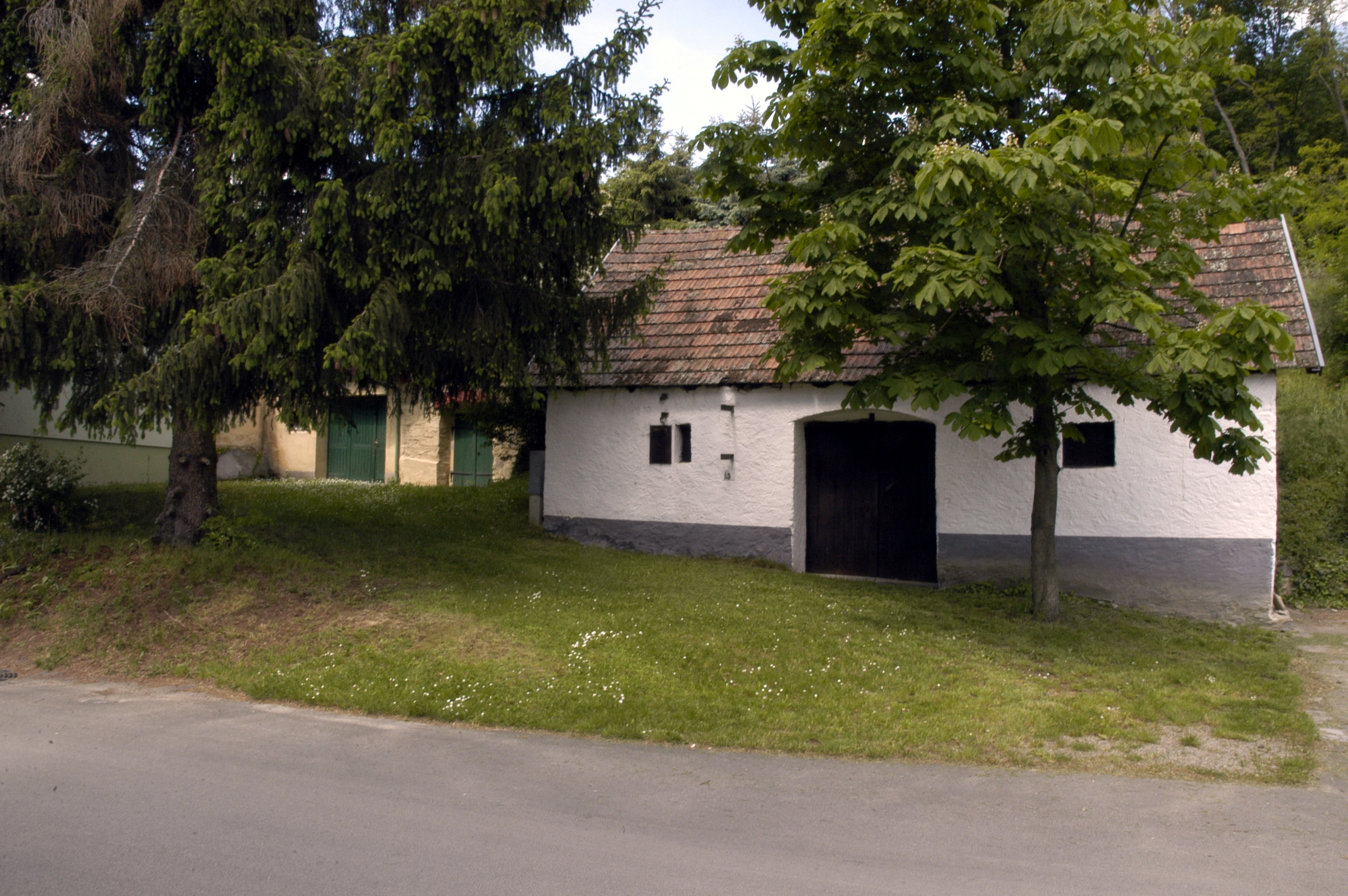 Objekte in der Kellergasse Waitzendorf (Gemeinde Schrattenthal)